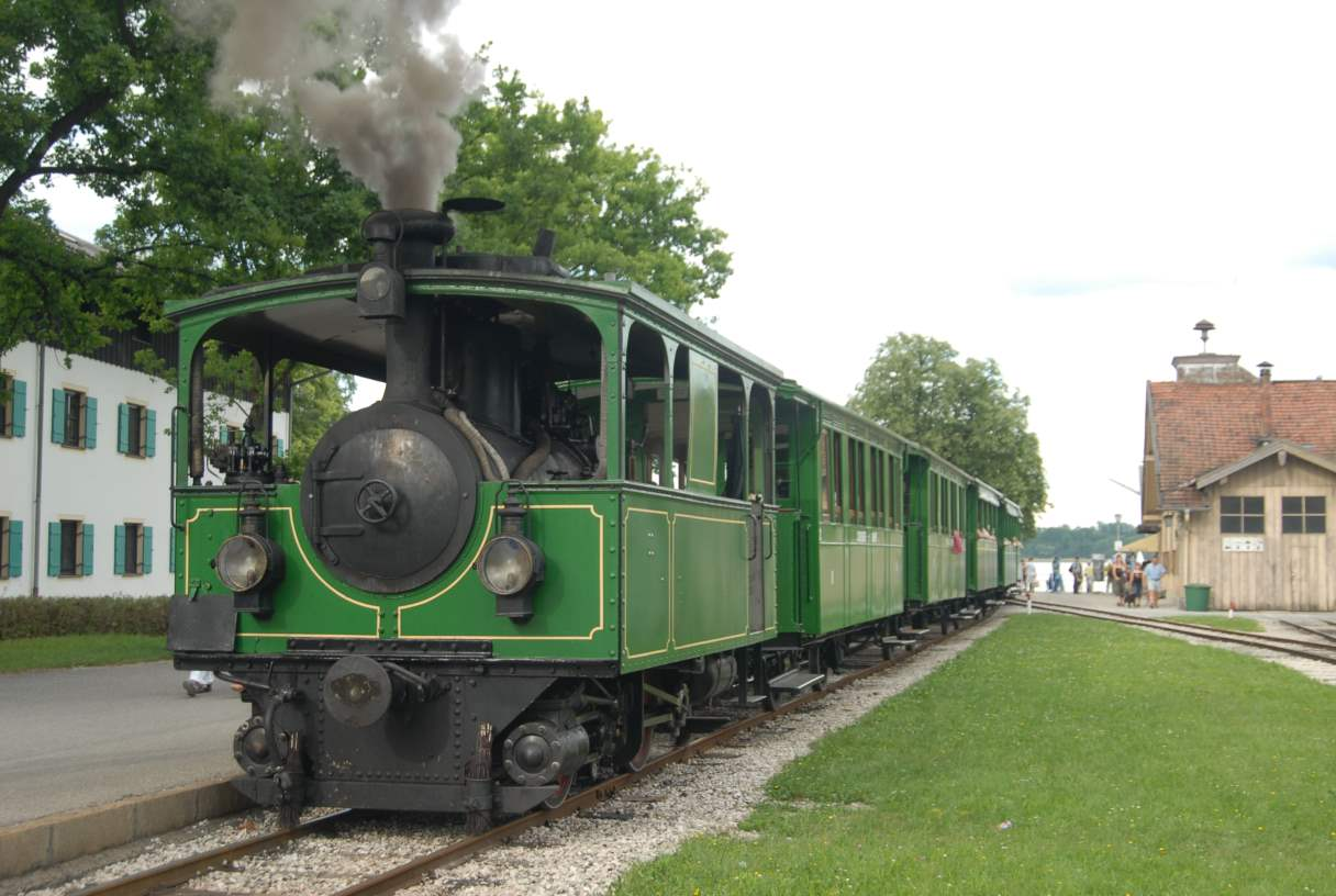 Chiemseebahn